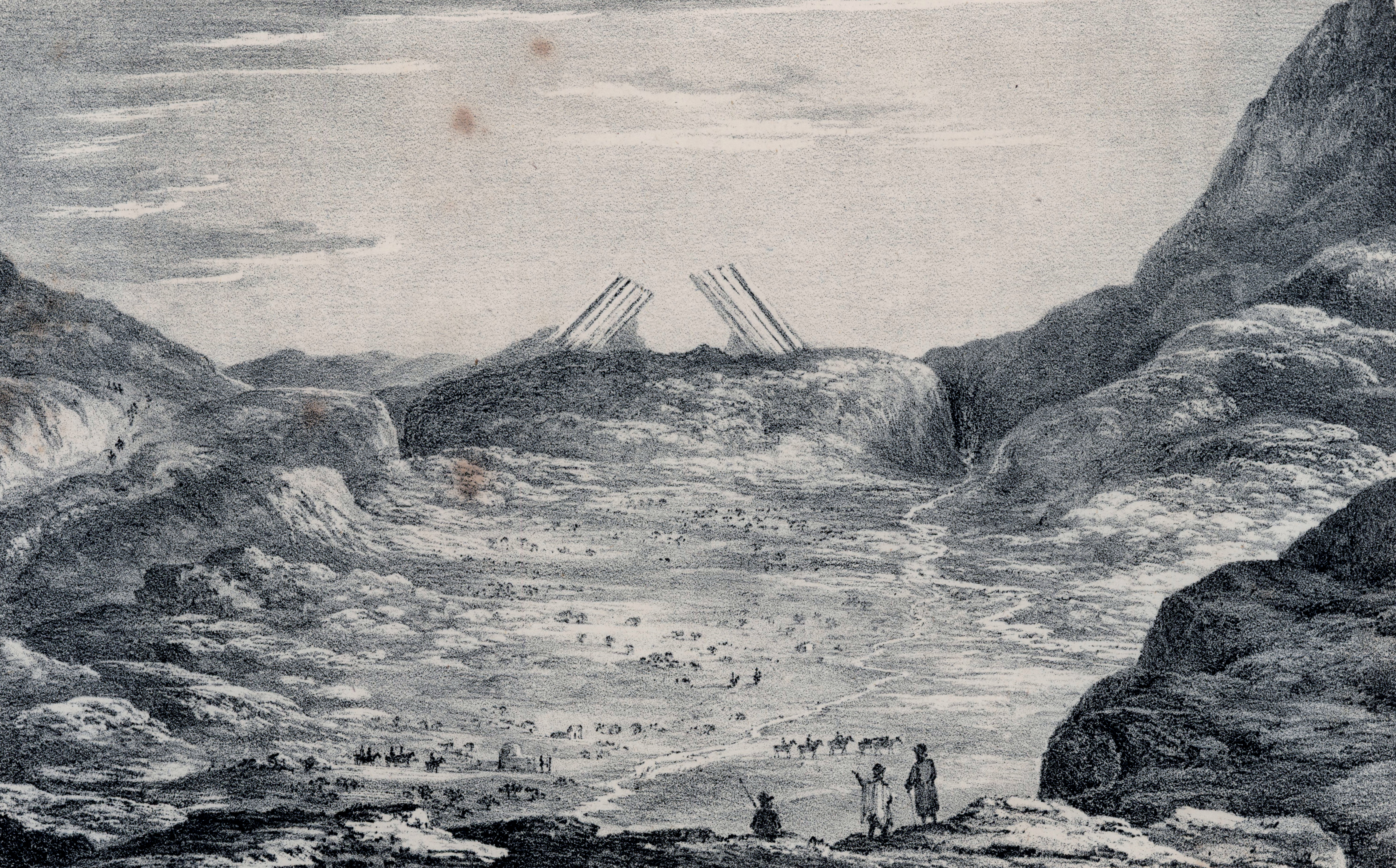 El paso de Uspallata, dibujo del viajero y filántropo inglés Peter Schmidtmeyer; litografía coloreada de Agostino Aglio; impresa por Rowney & Forster y publicada en el libro del Travels into Chile, over the Andes, in the years 1820 and 1821, London: Longman, Hurst, Rees, Orme, Brown and Green, 1824.